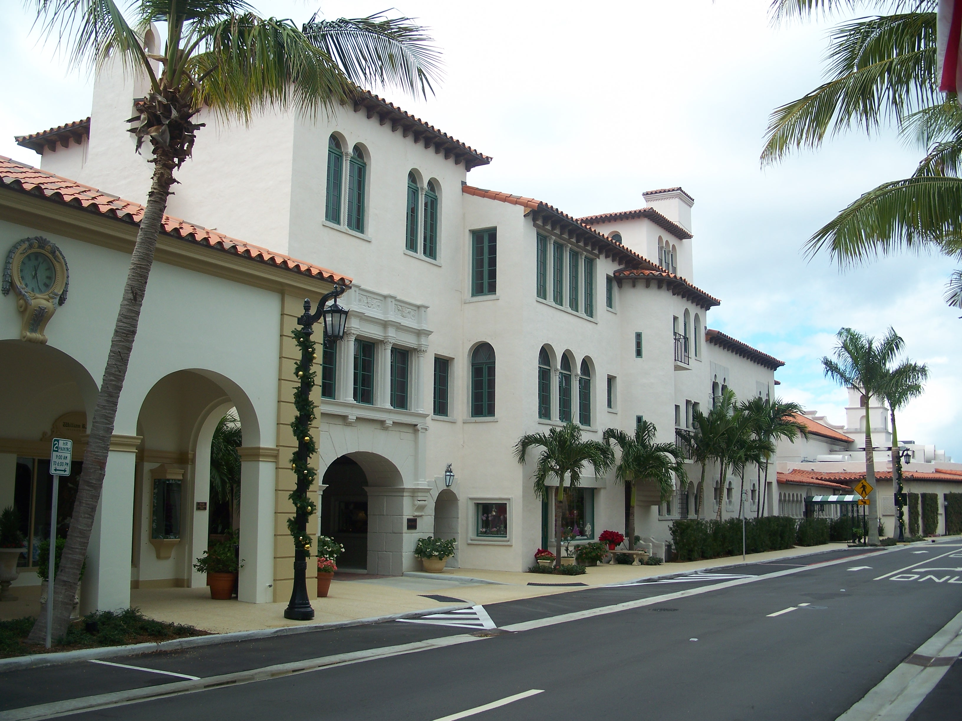 Palm Beach, Florida: Everglades Club